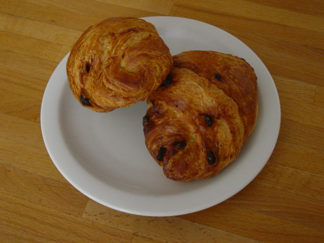 Boterkoeken: een typisch Vlaamse ontbijtkoek